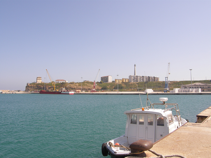 Vasto